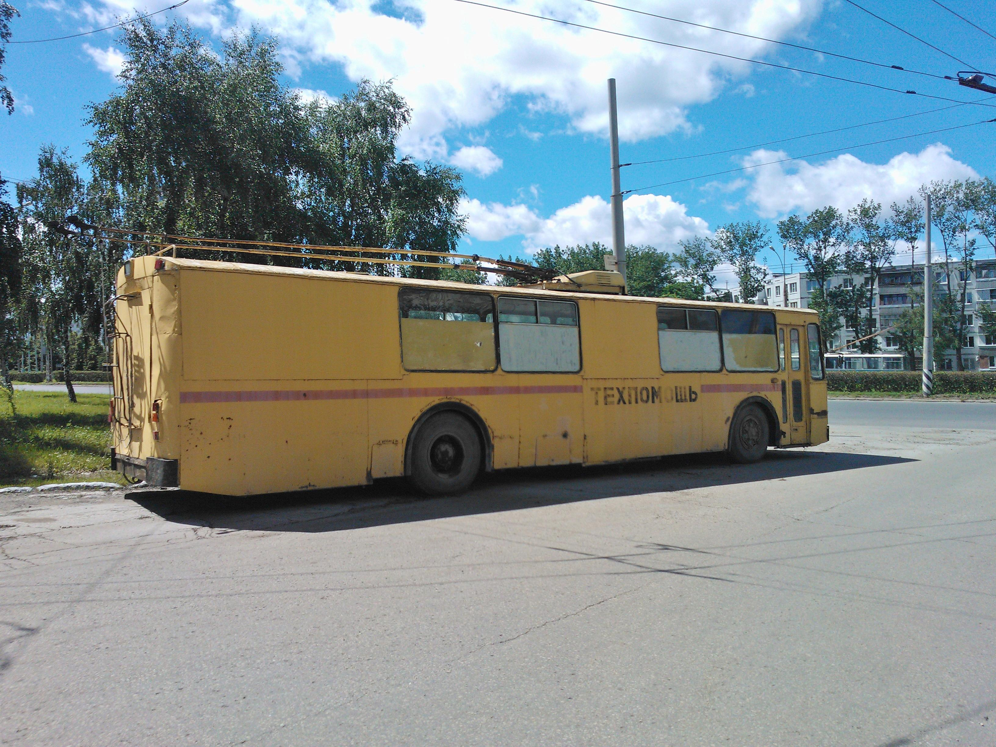 Троллейбус технической помощи, стоящий на площадке диспетчерской "7 квартал".